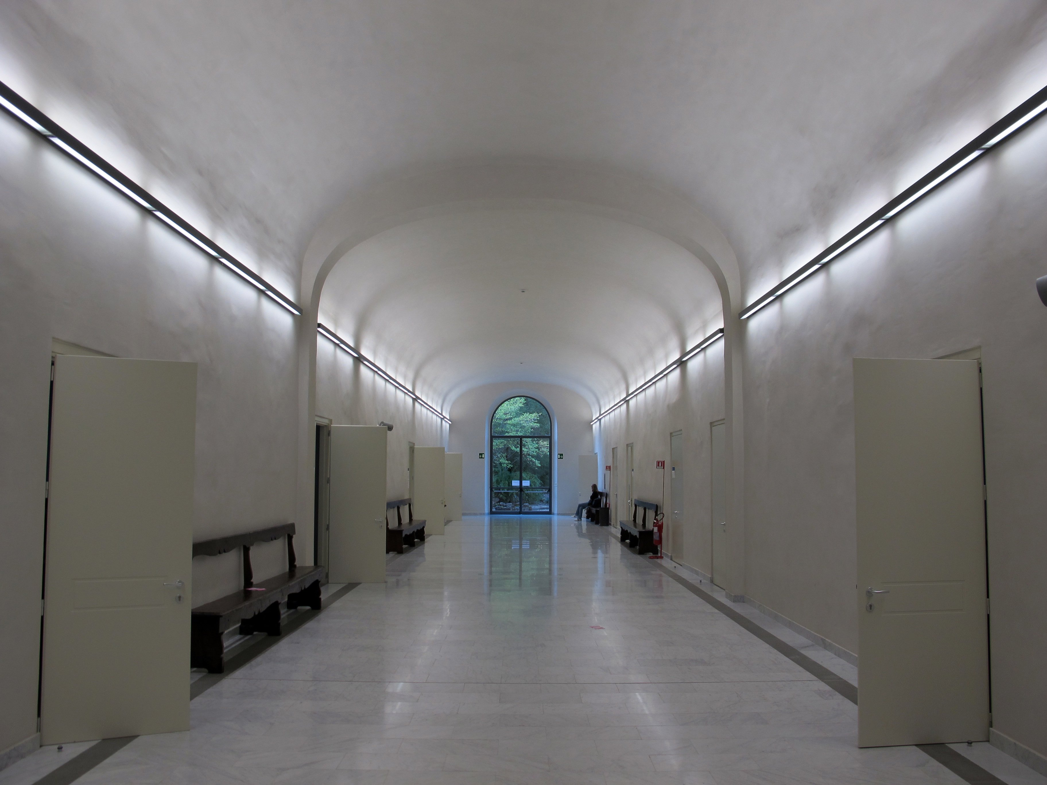 Firenze